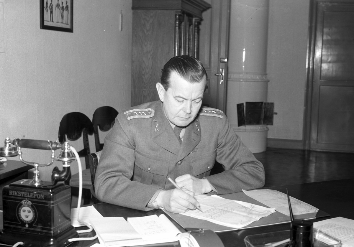 Överste Carl Hamnström vid Hälsinge regemente (I 14) år 1941.